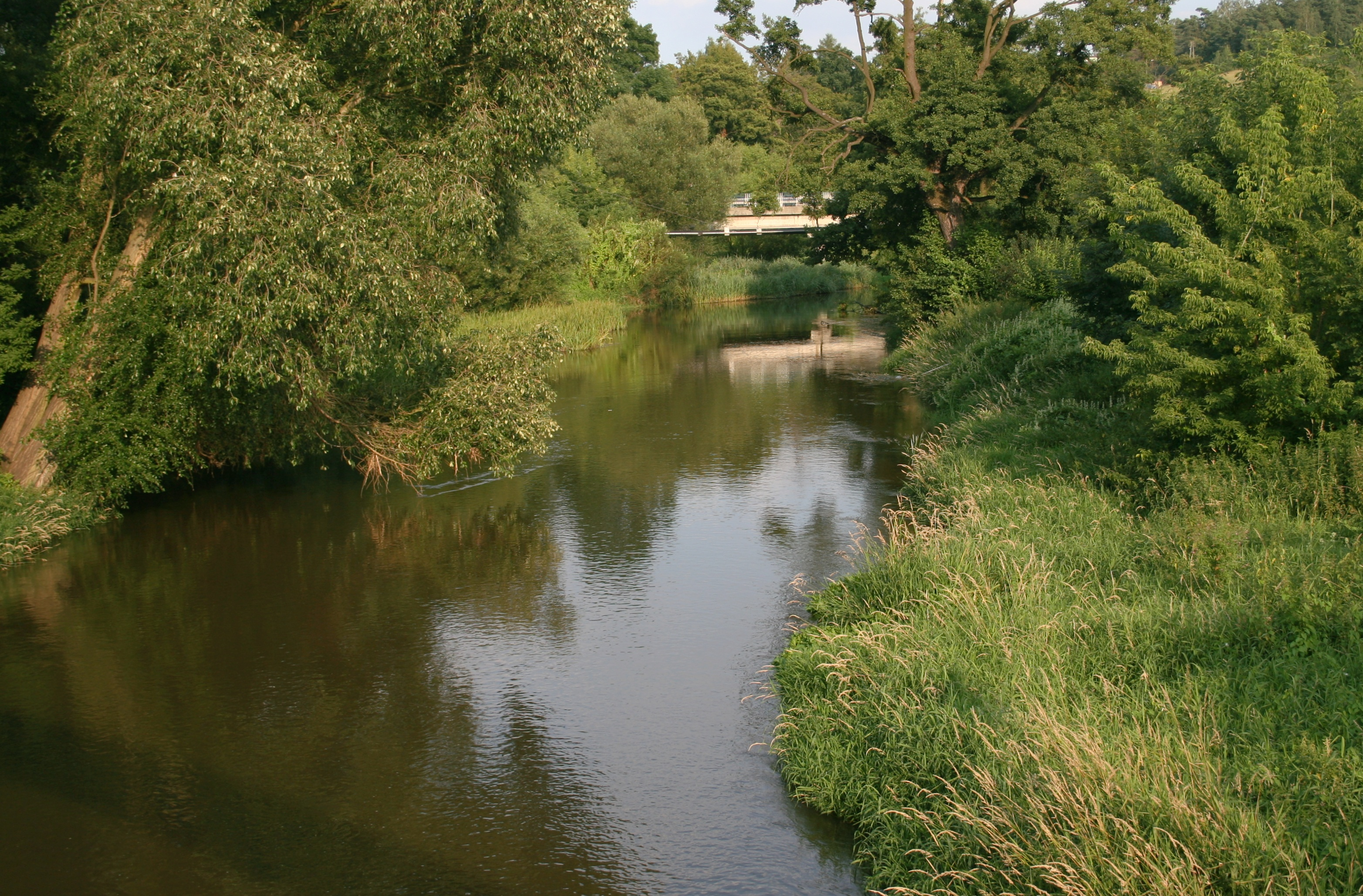 Warta w miejscowości Mstów , woj. śląskie